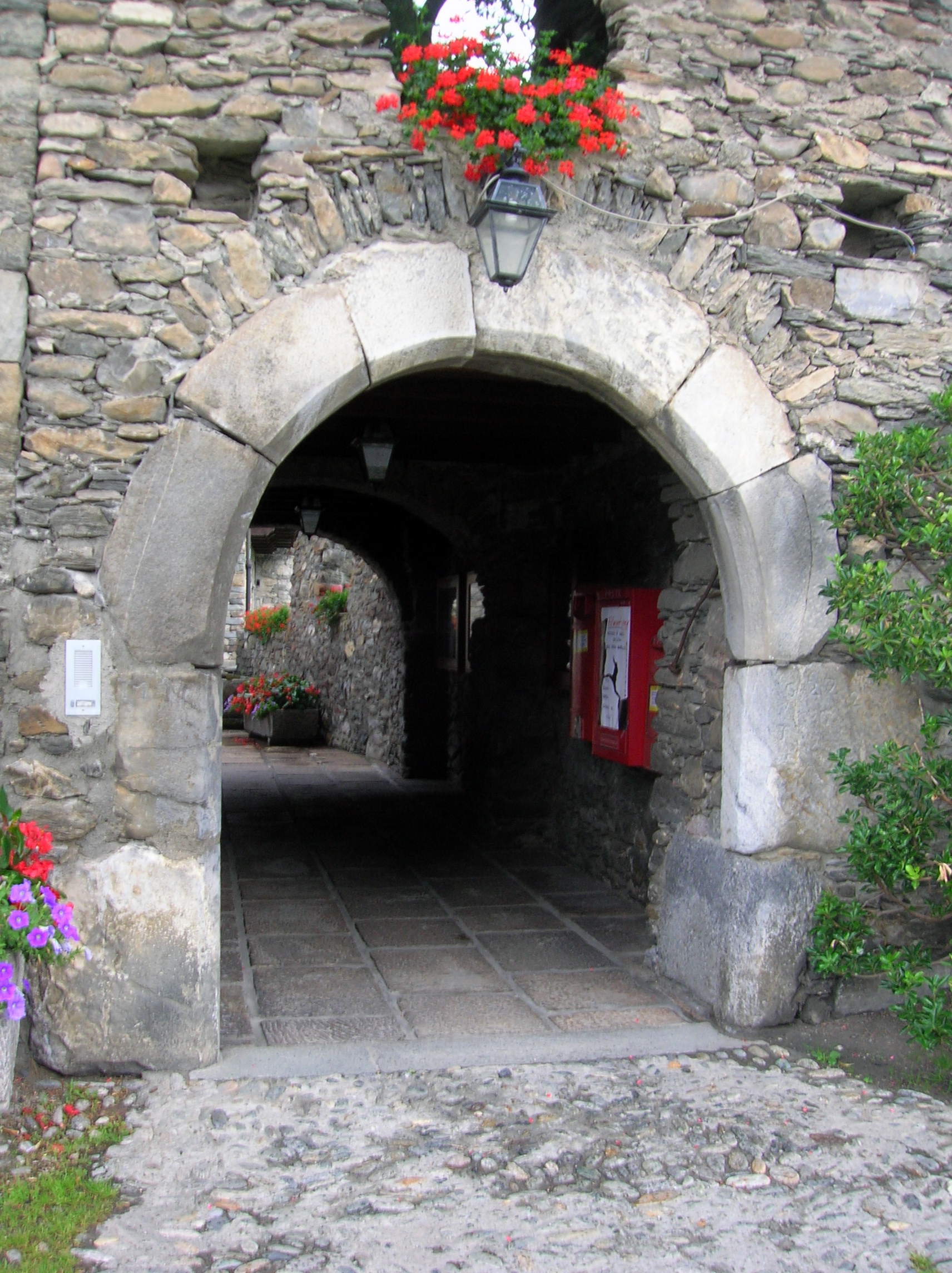 Maison Gerbollier, La Salle, Valle d'Aosta, Italia.